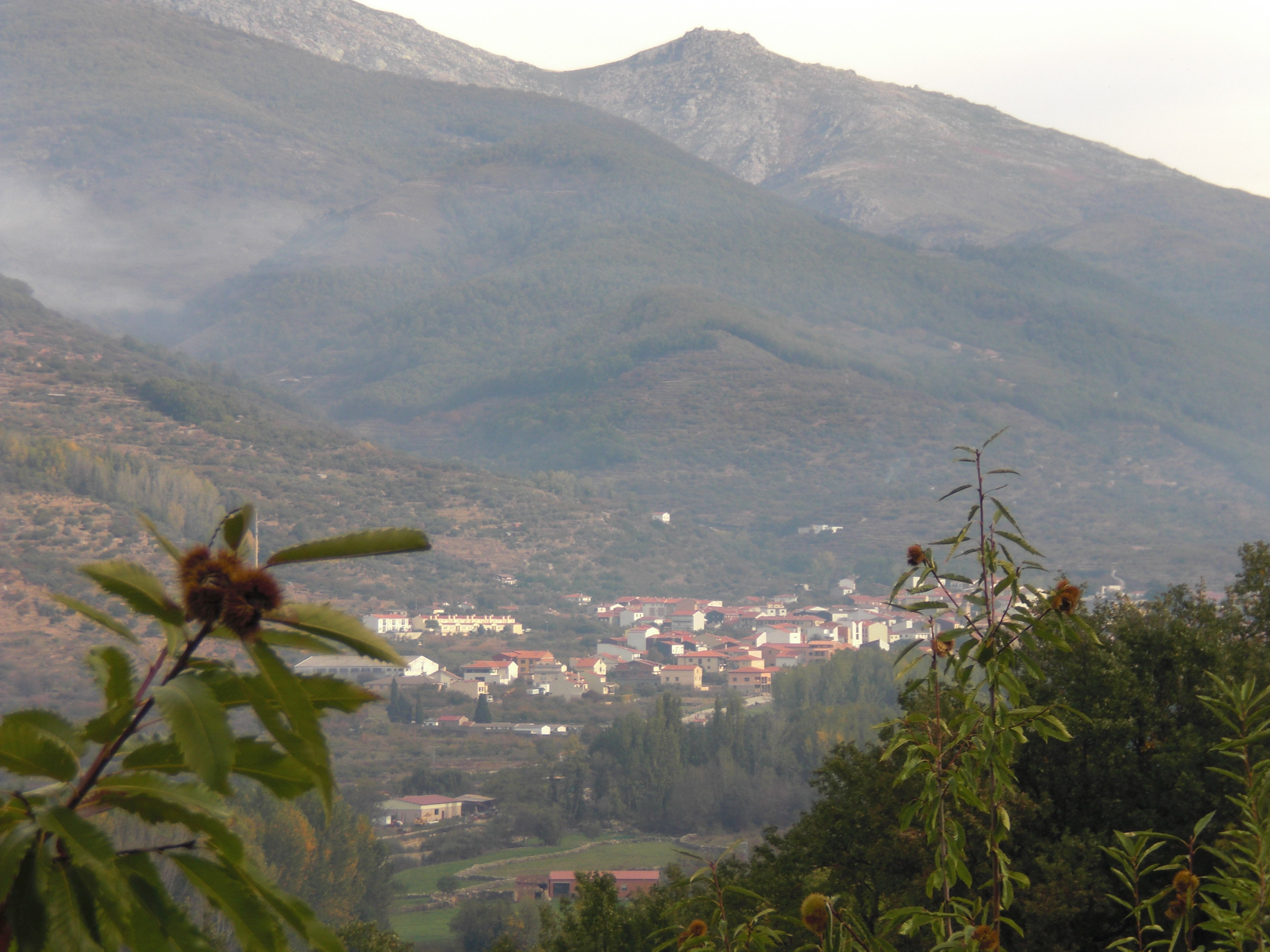 panoramo de la loĝloko Jerte (Cáceres)